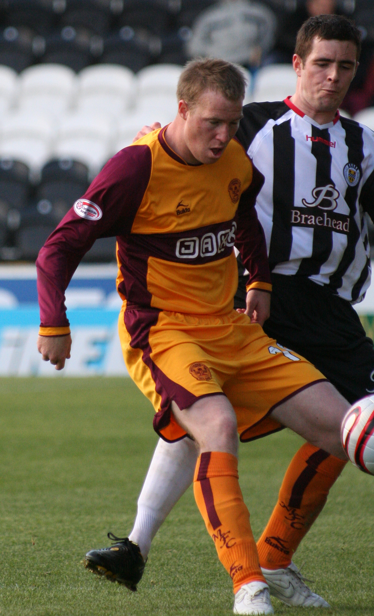 Clarkson